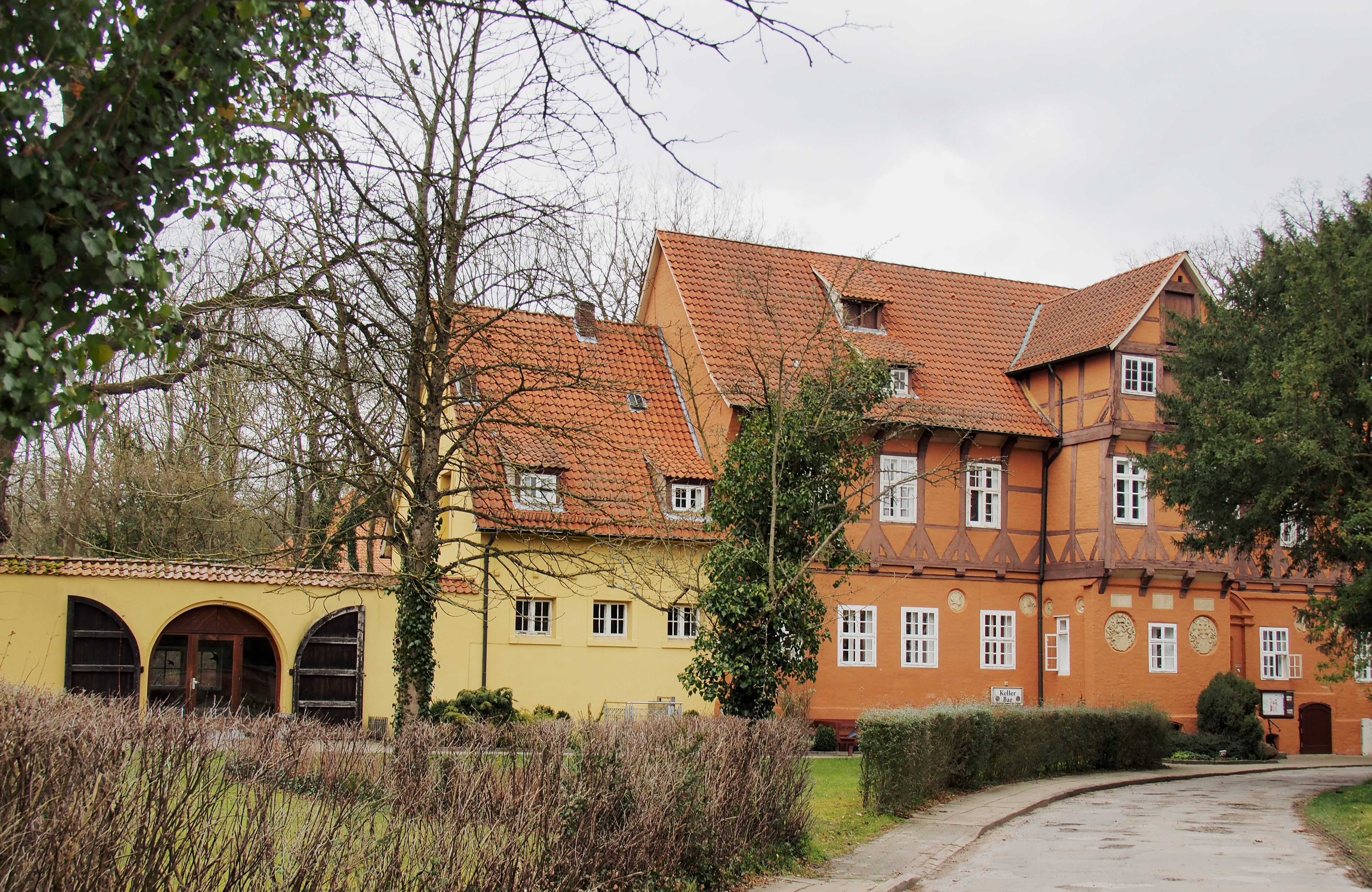 Ehemaliges Amtsgerichtsgebäude von 1541, Klosterweg 4 in Medingen, Bad Bevensen, jetzt Teil des Gustav Stresemann Instituts